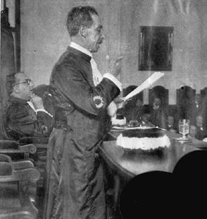 Carlos Chagas, em seu discurso como professor da Faculdade de Medicina do Rio de Janeiro